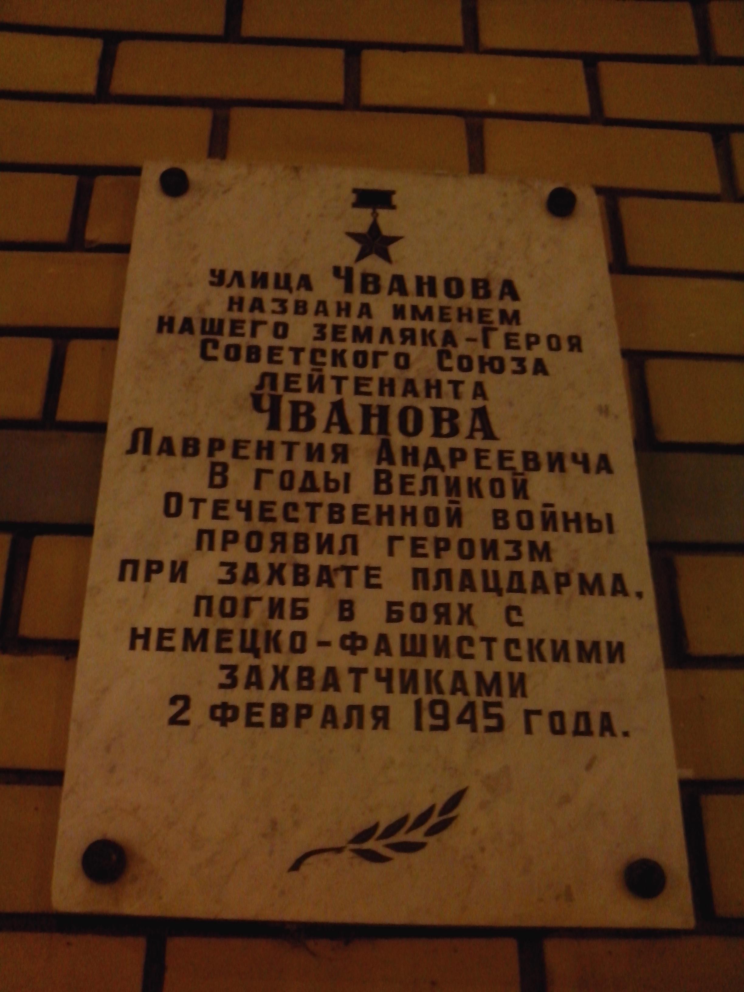 Мемориальная табличка улицы Чванова Л.А. Табличка установлена в г. Кстово, Нижегородская область, РФ